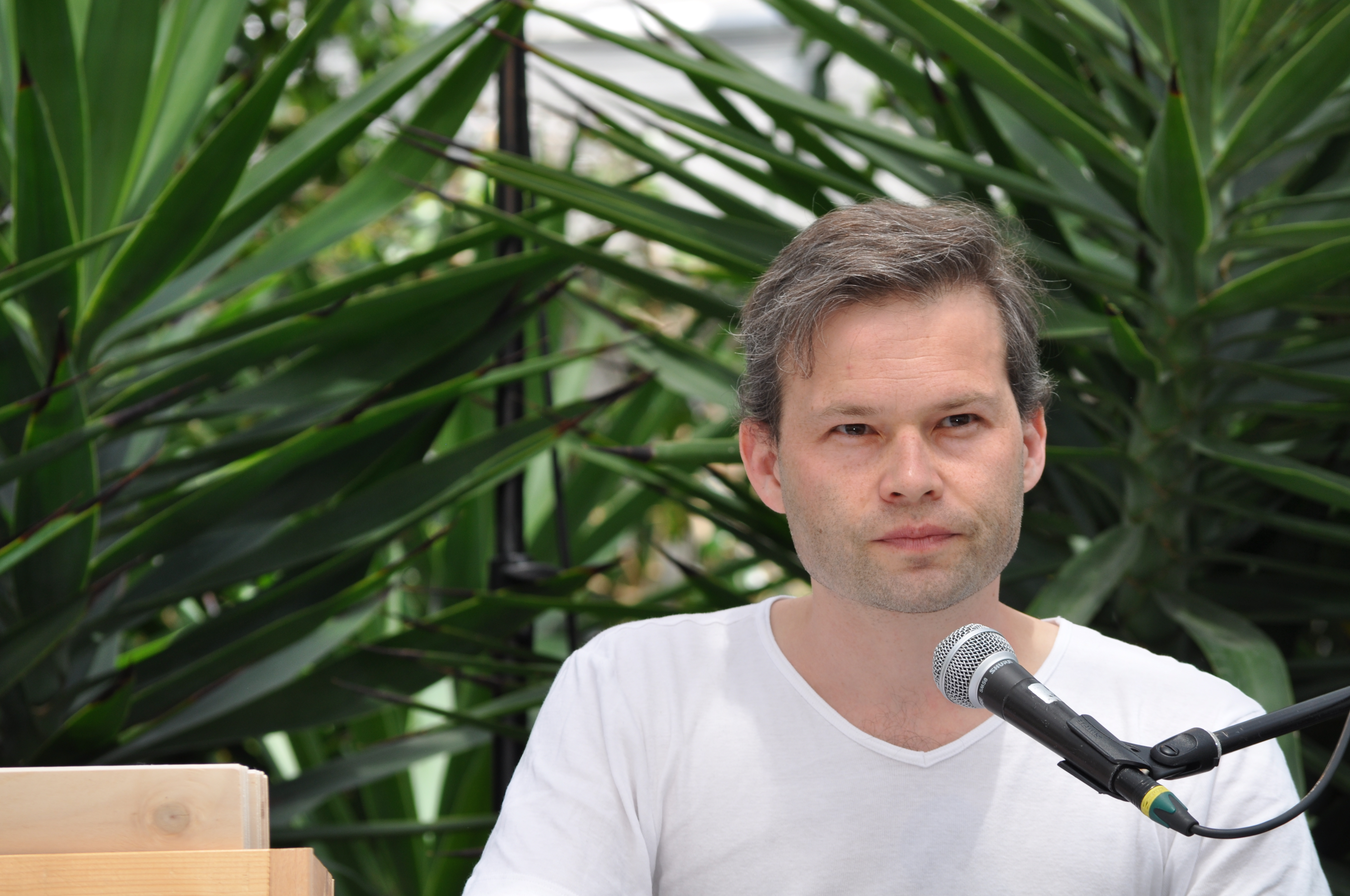 Michael von Burg, 2019